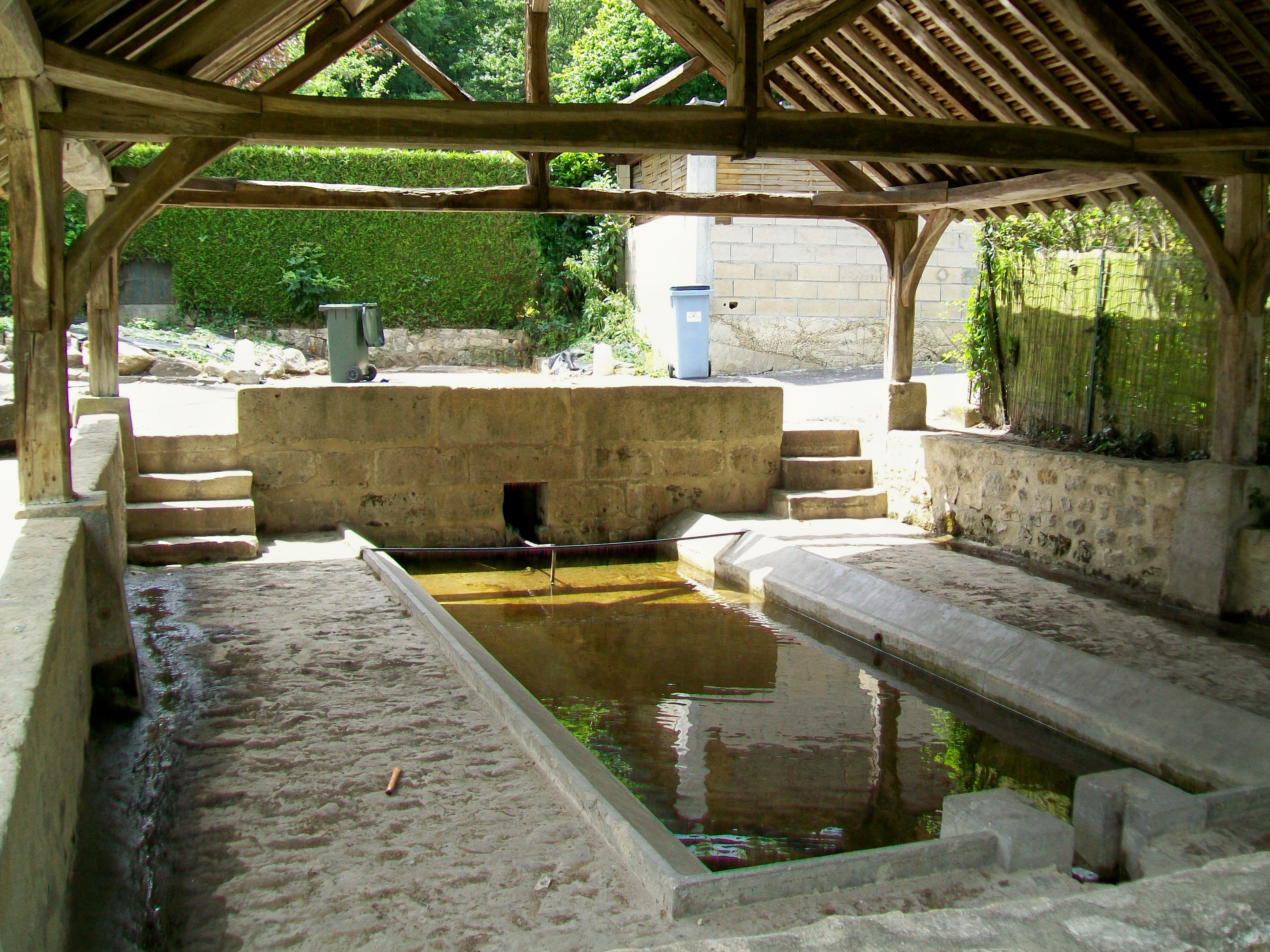 L'intérieur du lavoir communal, qui est conservé dans un état proche de celui d'origine.